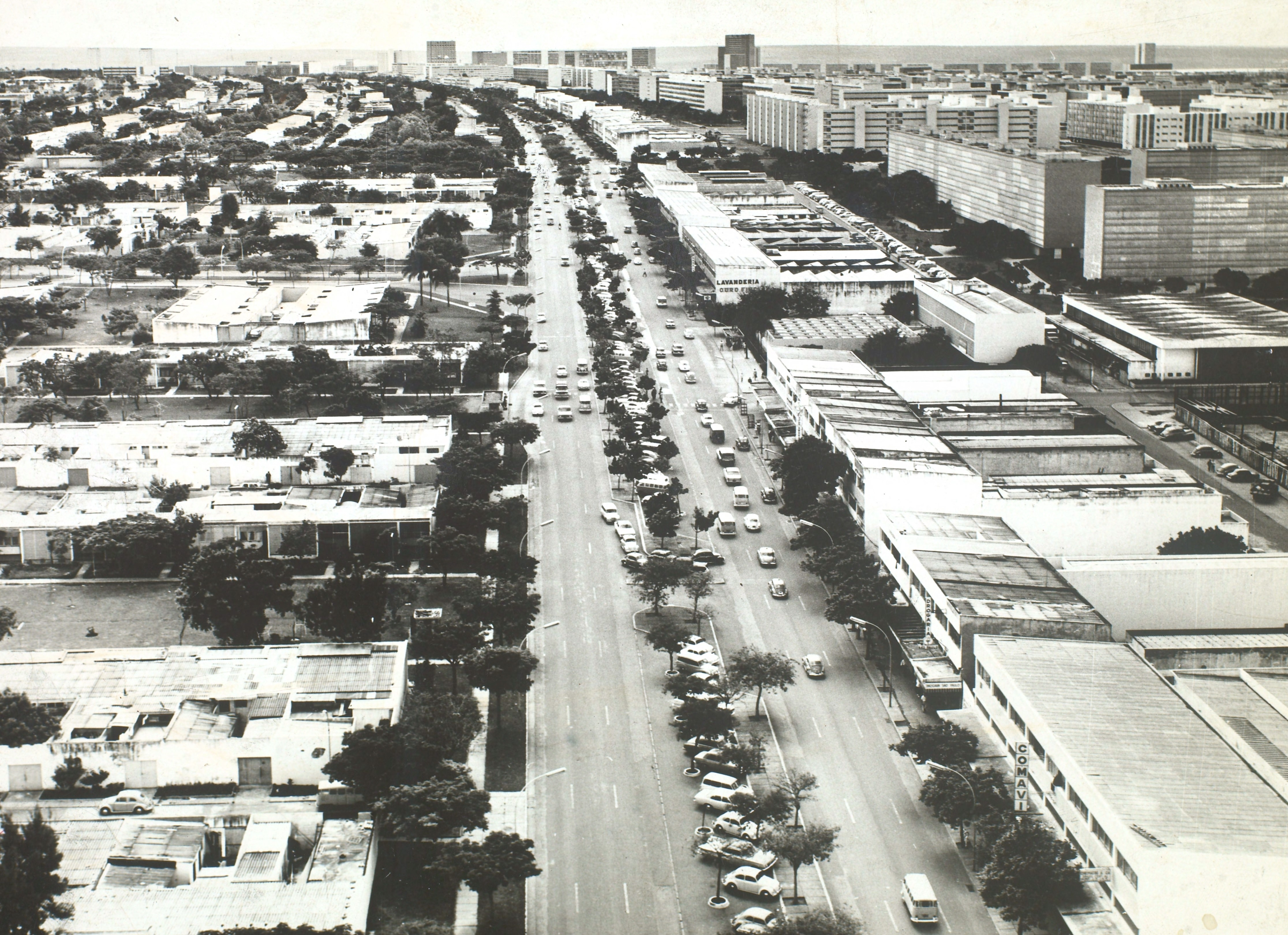 Fotografia do Fundo Correio da Manhã, sob a guarda do Arquivo Nacional.